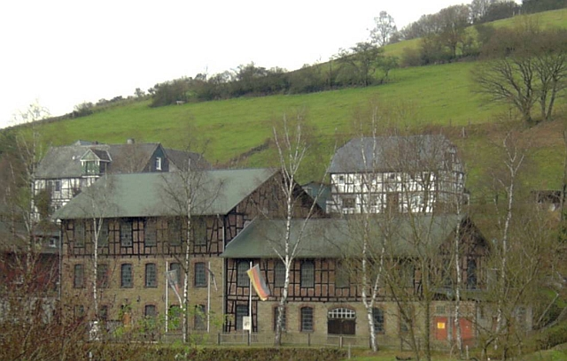 Besteckmuseum in Schmallenberg-Fleckenberg, Germany.